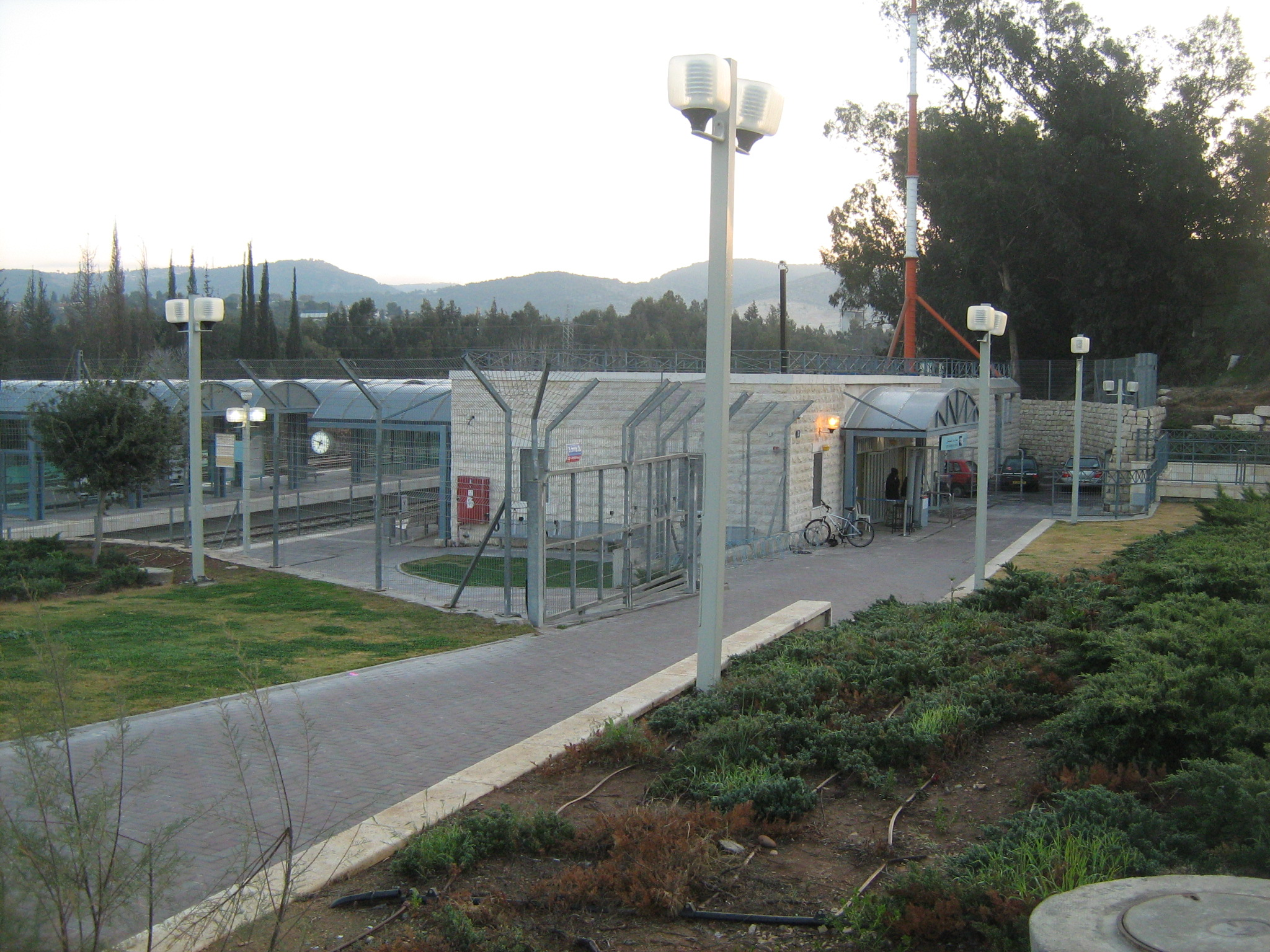 תחנת הרכבת בבית שמש